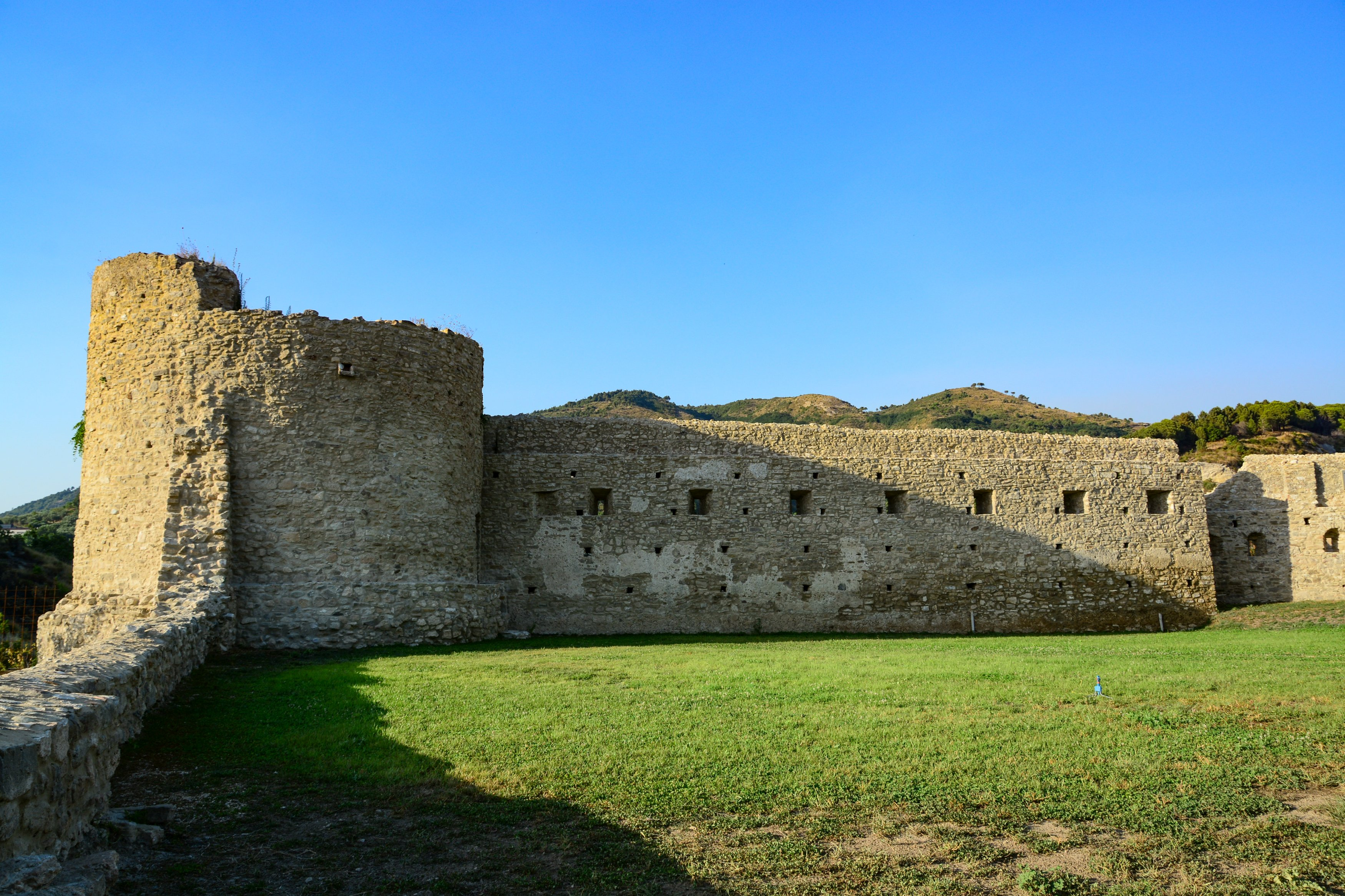 Castello di Savuto, la piazza d'armi This is a photo of a monument which is part of cultural heritage of Italy.